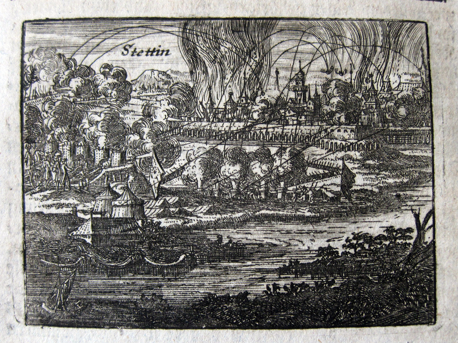 Belagerung von Stettin 1713